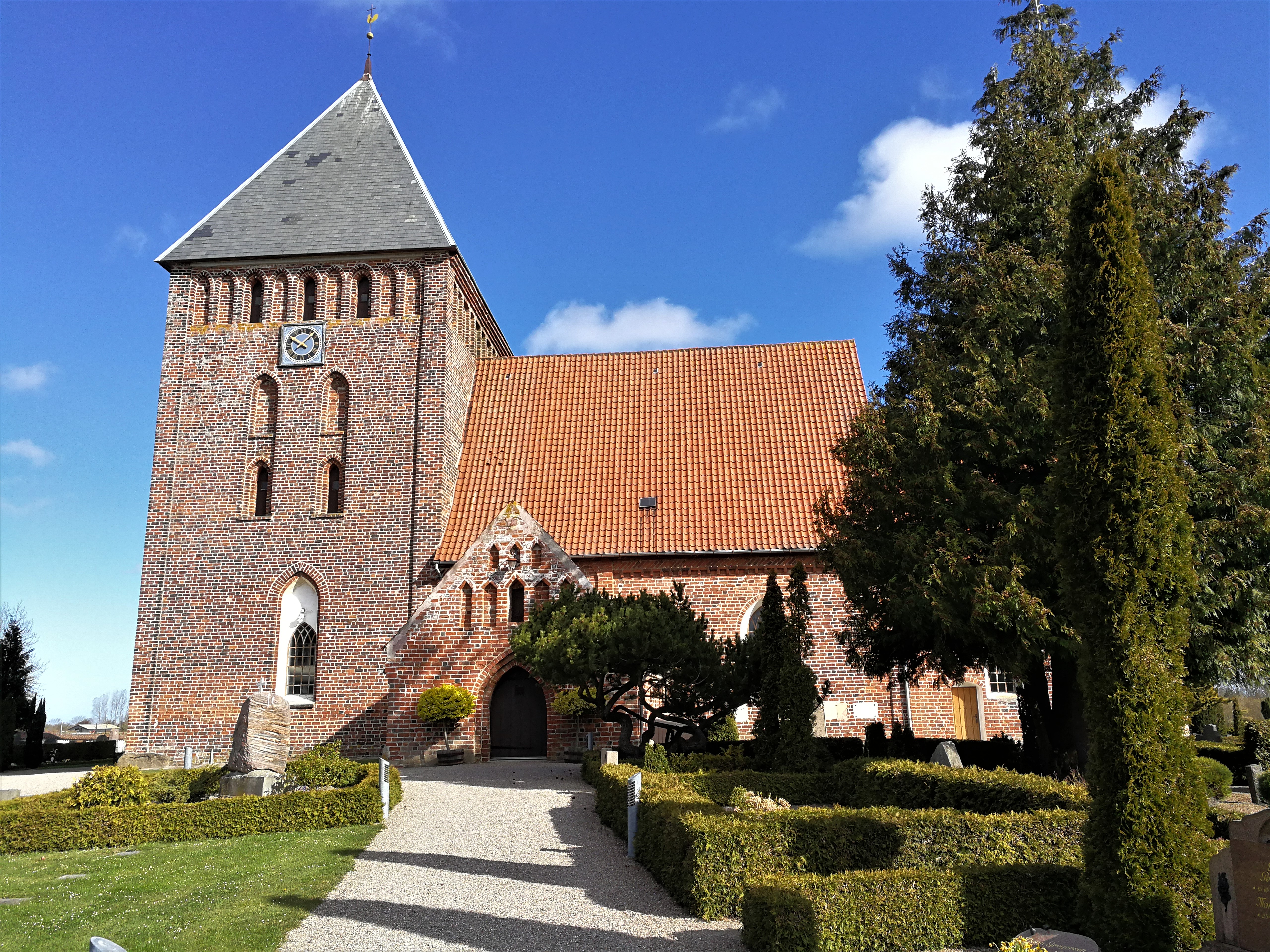 Østofte Gade 40, 4951 Nørreballe, Danmark